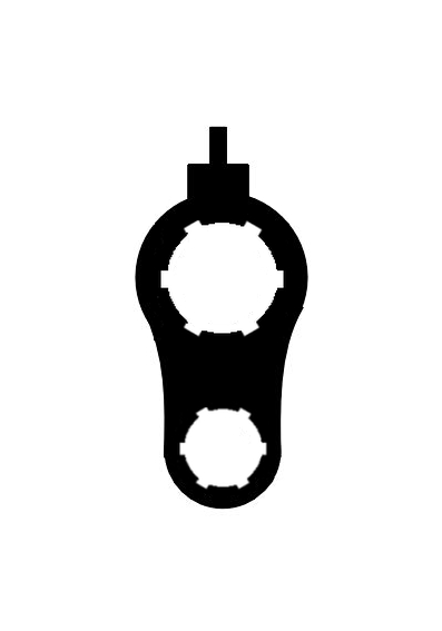 Laufbündelung eines Bergstutzens.